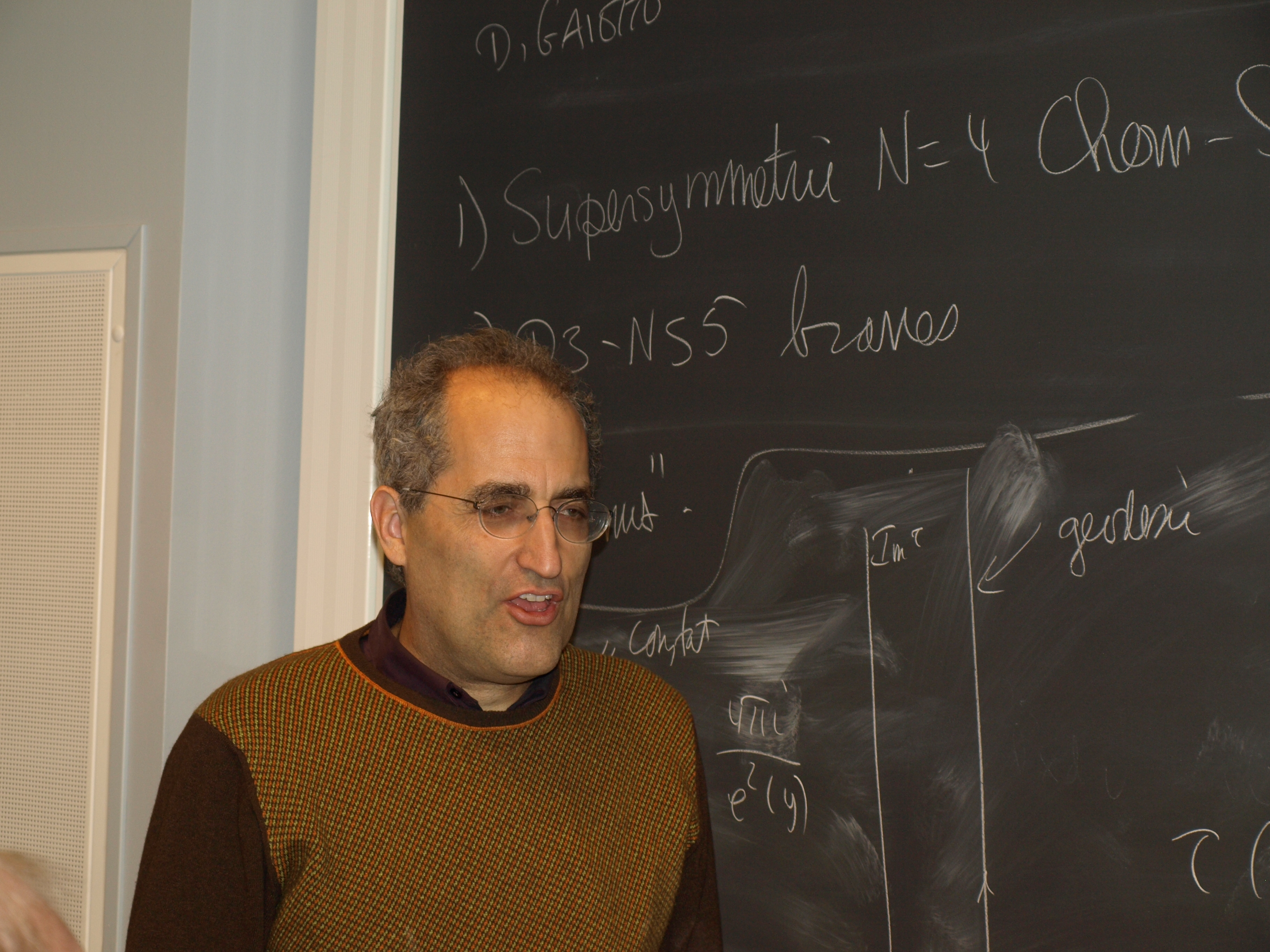 Edward Witten giving a speech at Chalmers tekniska högskola, Göteborg, Sweden